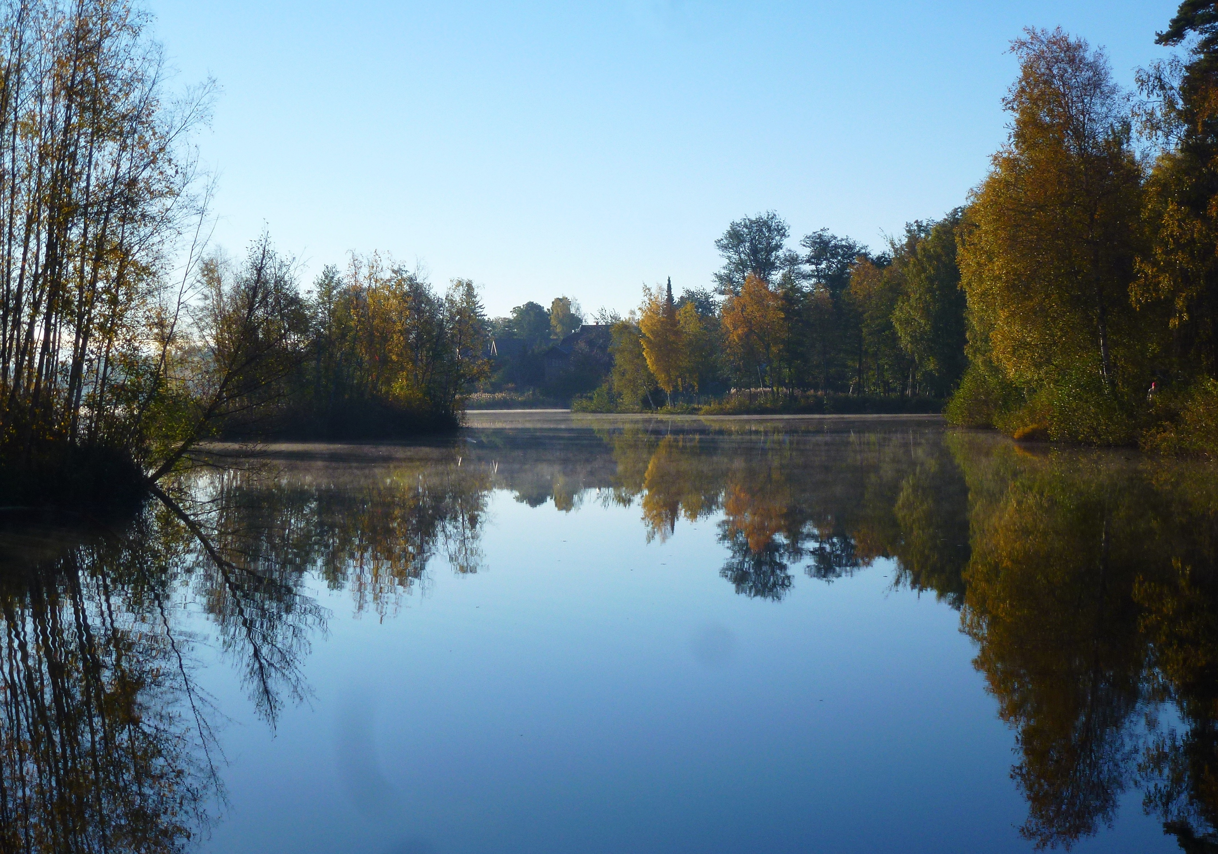 Långsjön, Älvsjö